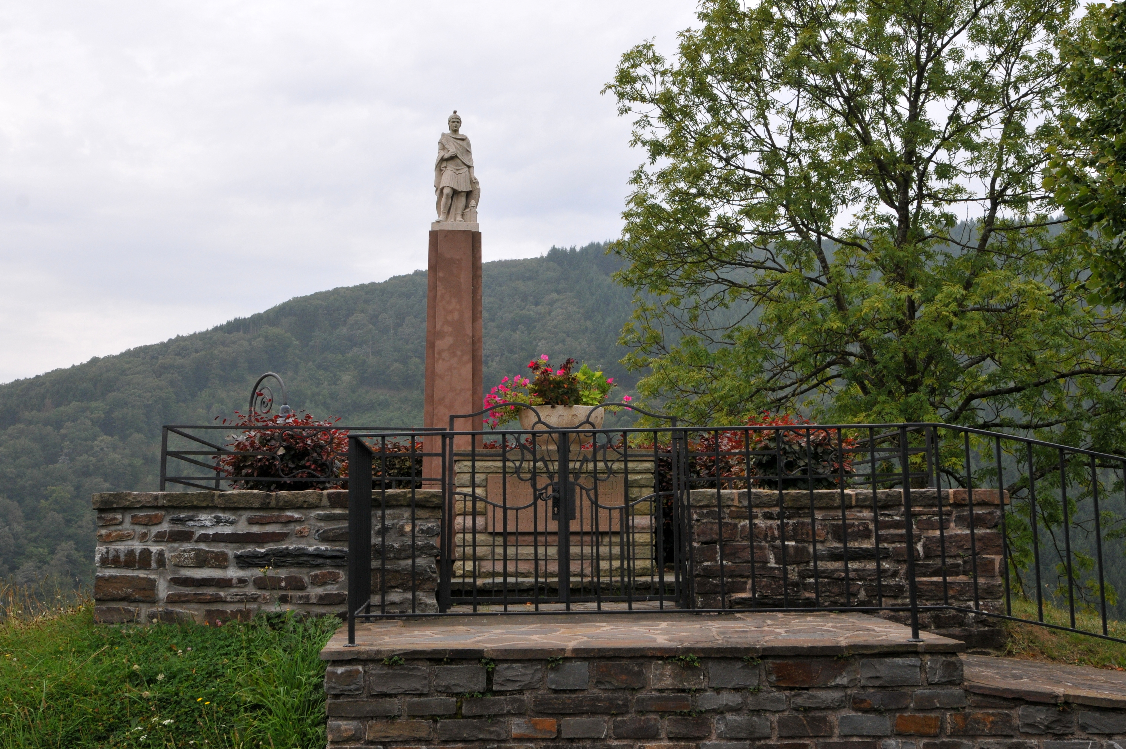 Donatus Monument zu Méchela.